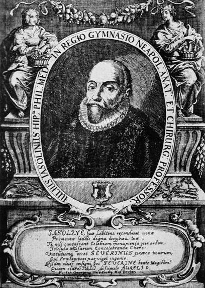 Giulio Iasolino – (Incisione di P. Troschel; dalla Zootomia Democritea, Norimberga, 1645)